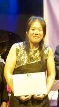 Da-Hae Kim, pianista de Corea del Sur, recibiendo en Madrid (España) el primer premio en el Concurso Internacional de Piano Delia Steinberg en su edición número 37, año 2018.